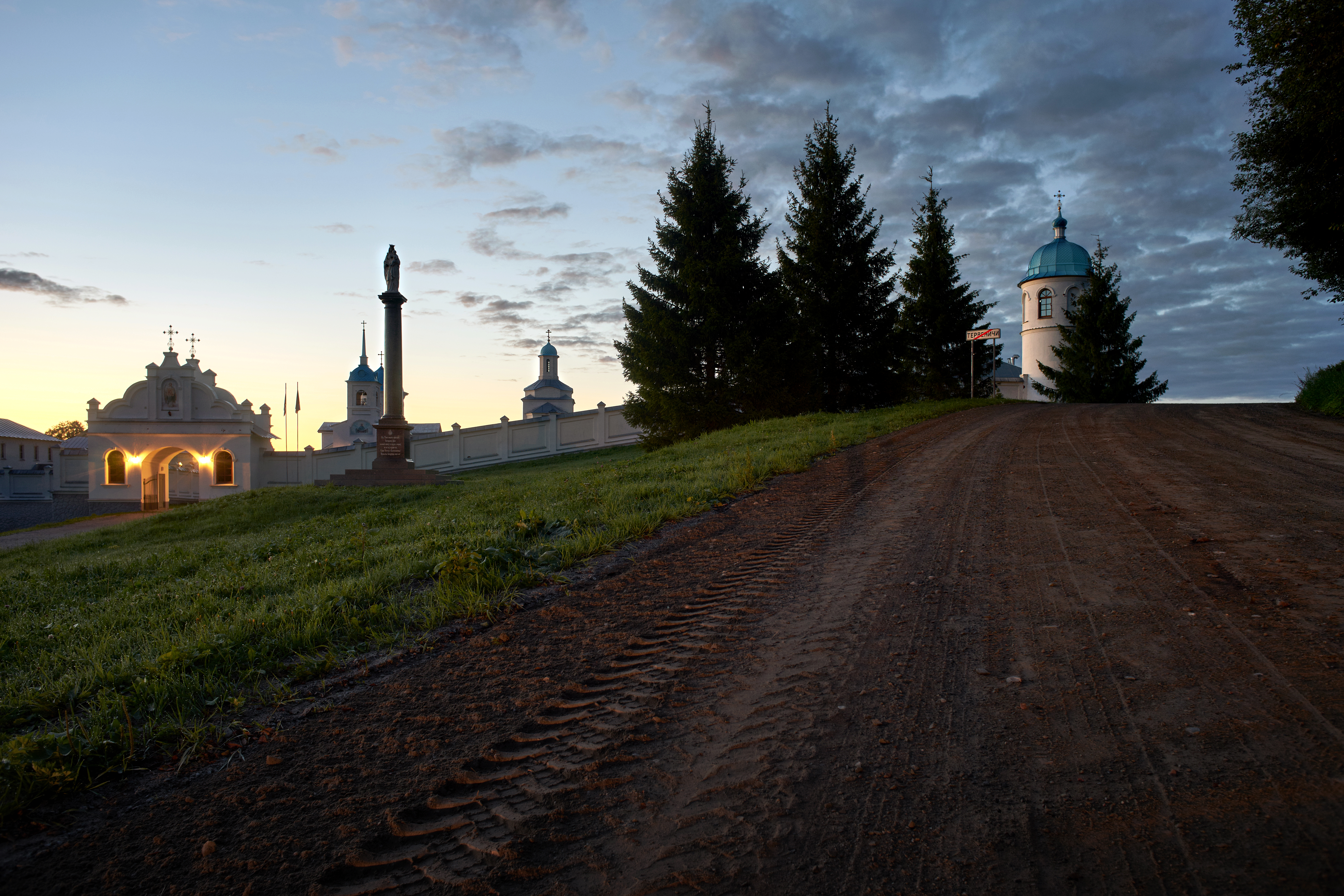 Покровский Тервенический женский монастырь, село Тервиничи тихвинского района ЛО.